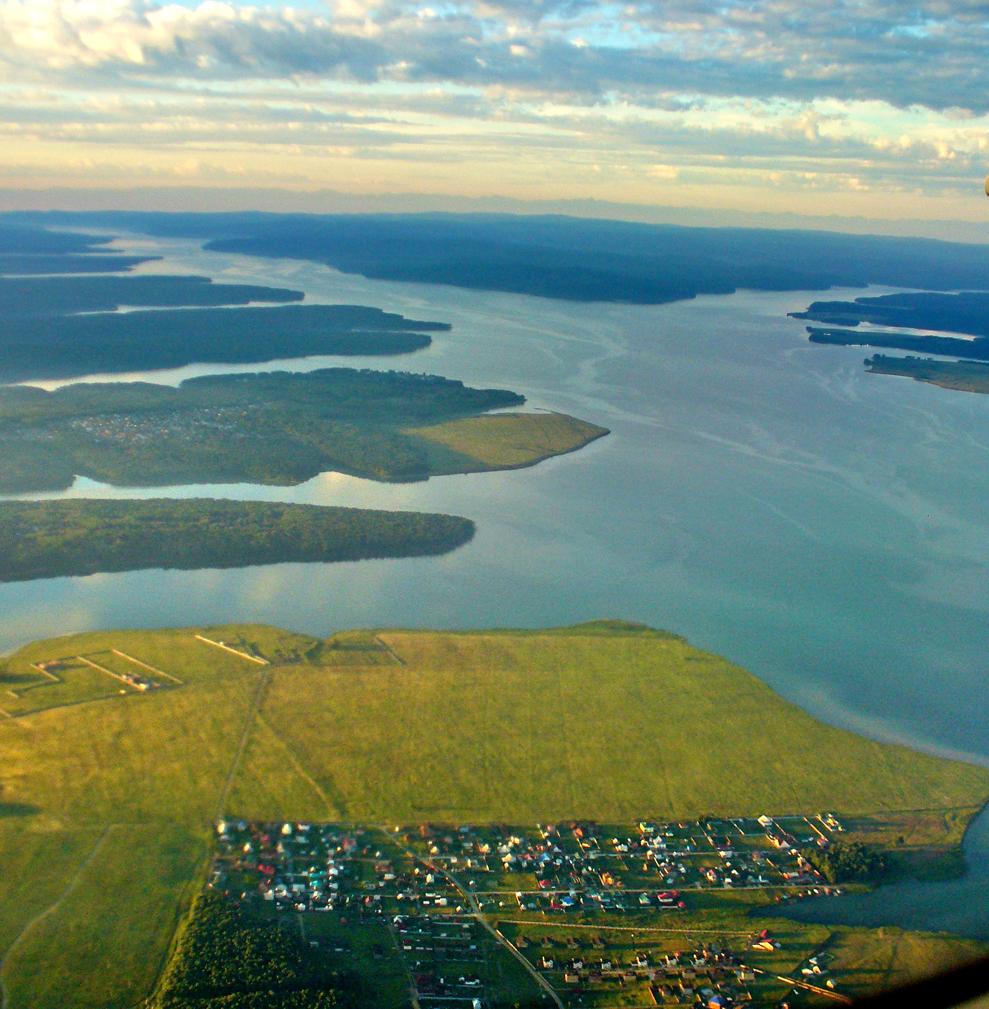 Ангара (Иркутское водохранилище), вид в сторону Байкала.